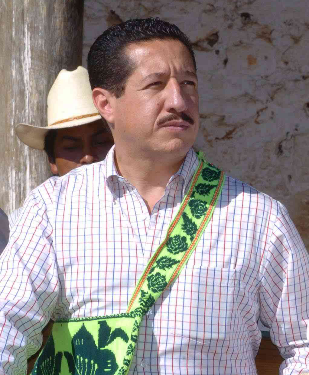 Ney González Sánchez, Gobernador de Nayarit (Fotografía recortada)